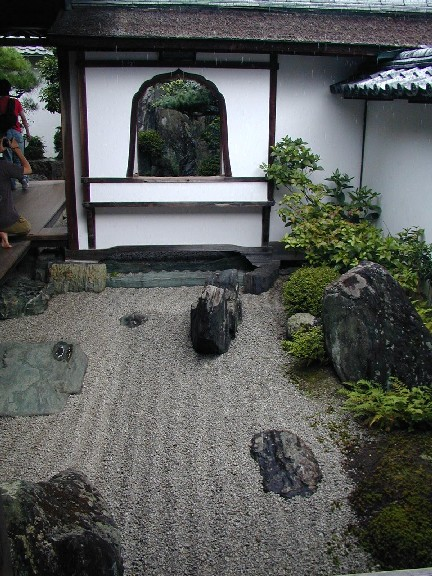 Daisen-in La foto è stata scattata da me a Kyoto (Giappone) il 15 agosto 2002 alle 13. Categoria:Immagini del Giappone